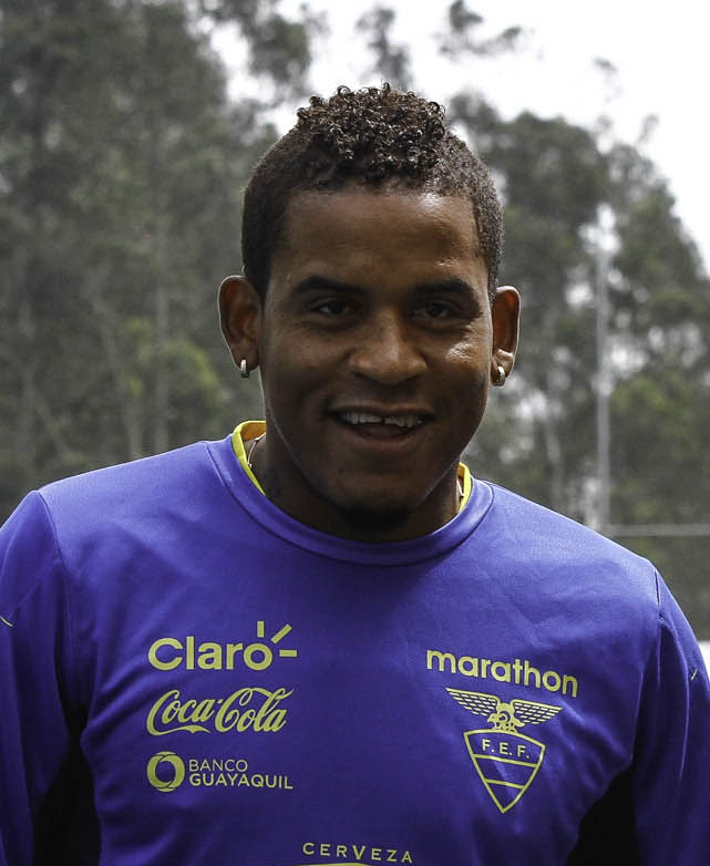 ENTRENAMIENTO TRI 20 MAV